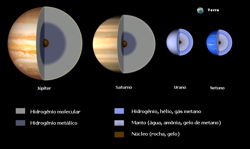 Interior dos gigantes gasosos (Gas Giant Interiors)